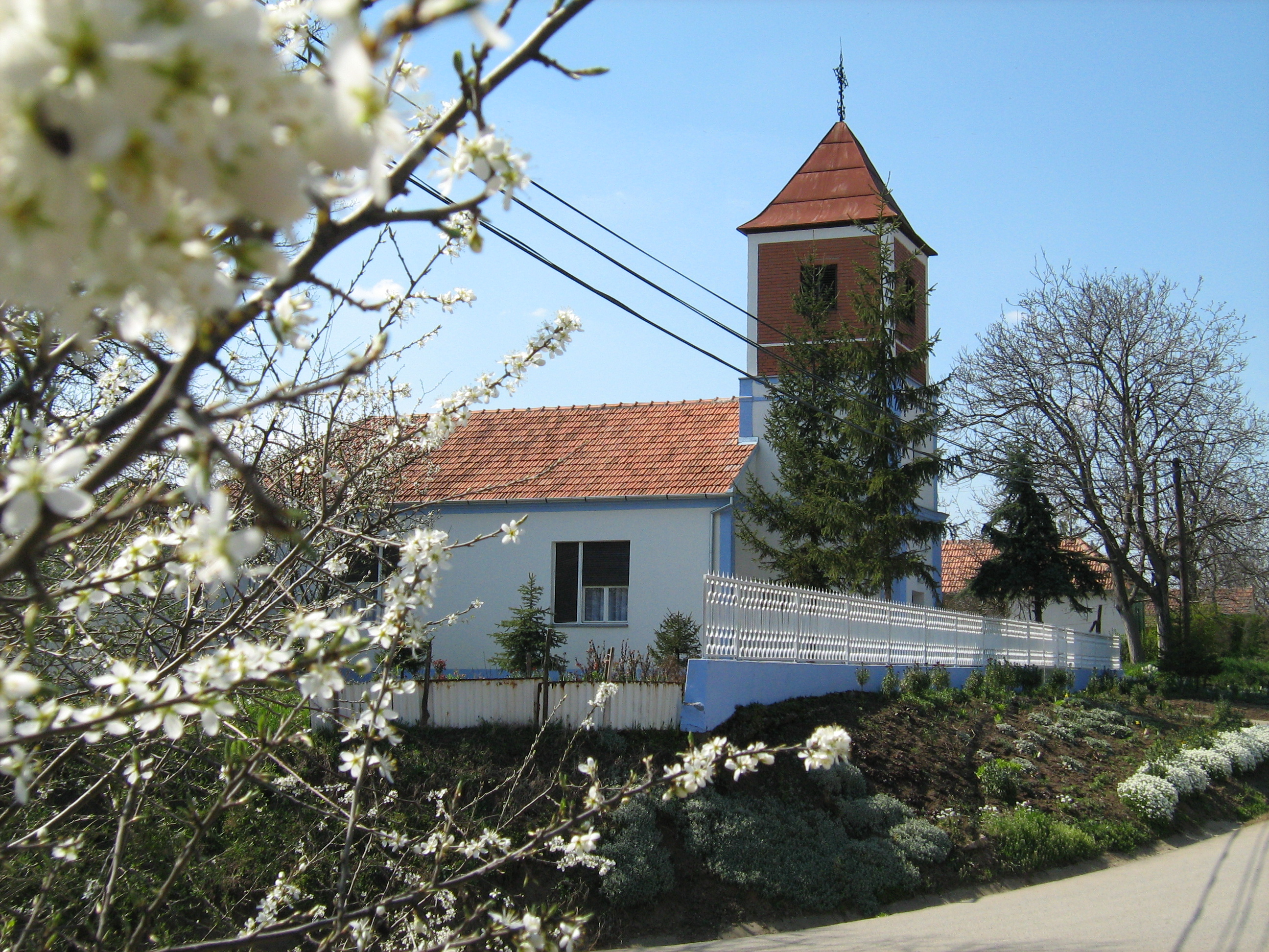 Evanielicky kostol